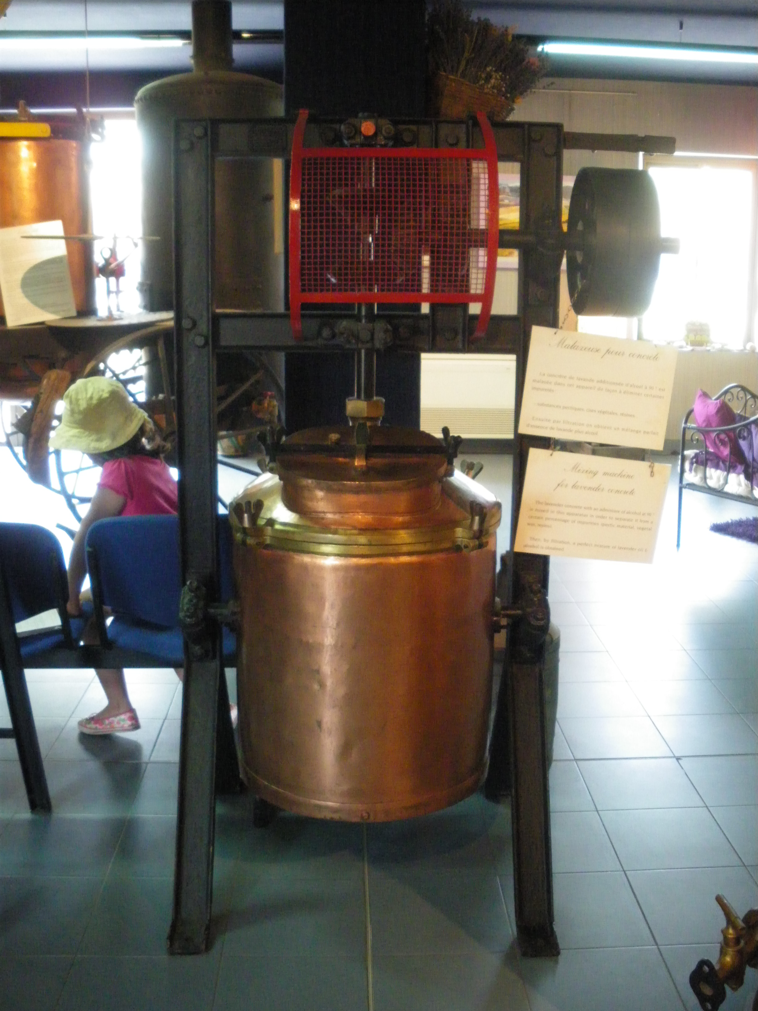 malaxeur à corcète de lavande, musée de la lavande